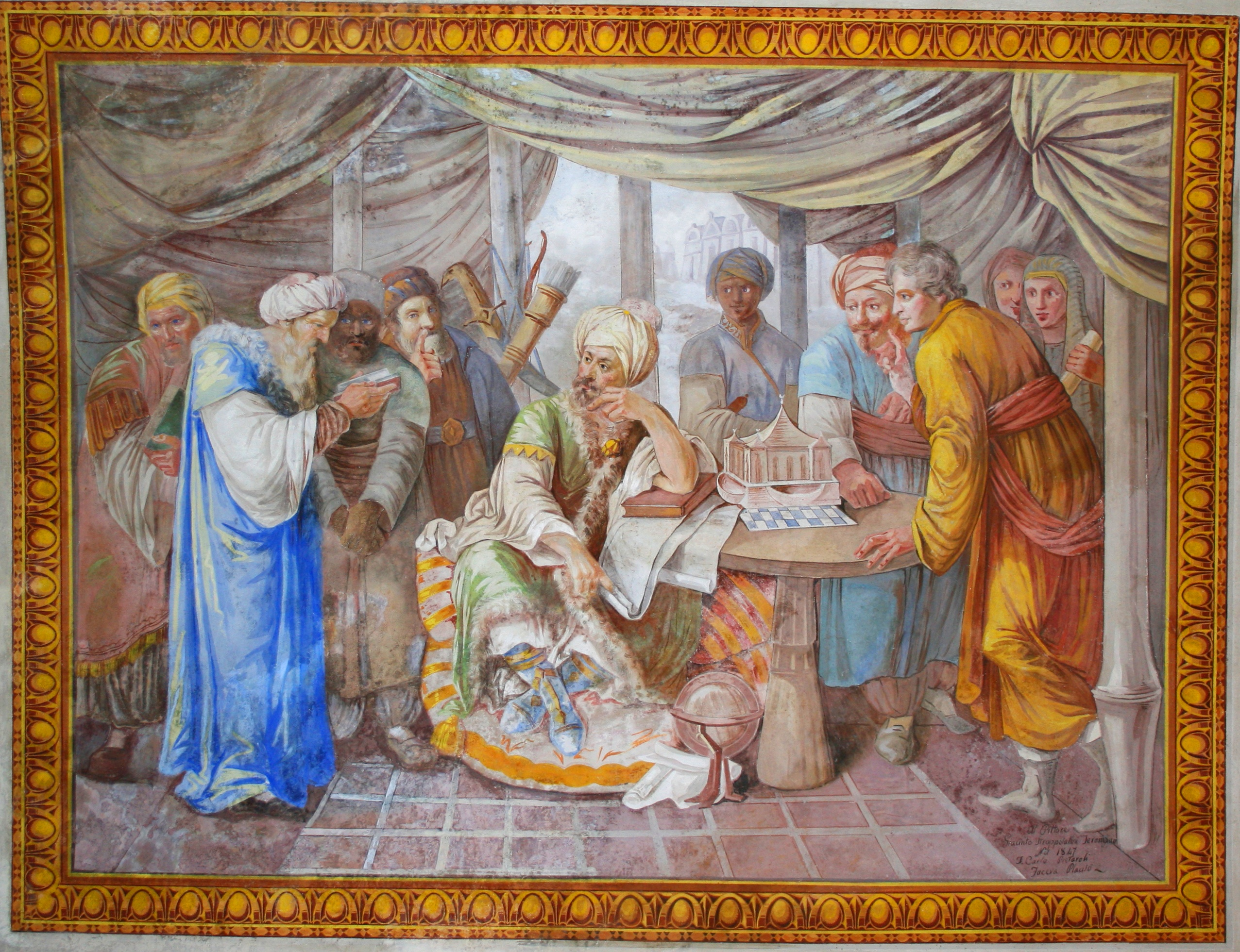 الأبد رودولف أكواڤيڤا (مُرتديًا رداءً أصفر) يتناقش مع السُلطان جلال الدين أكبر